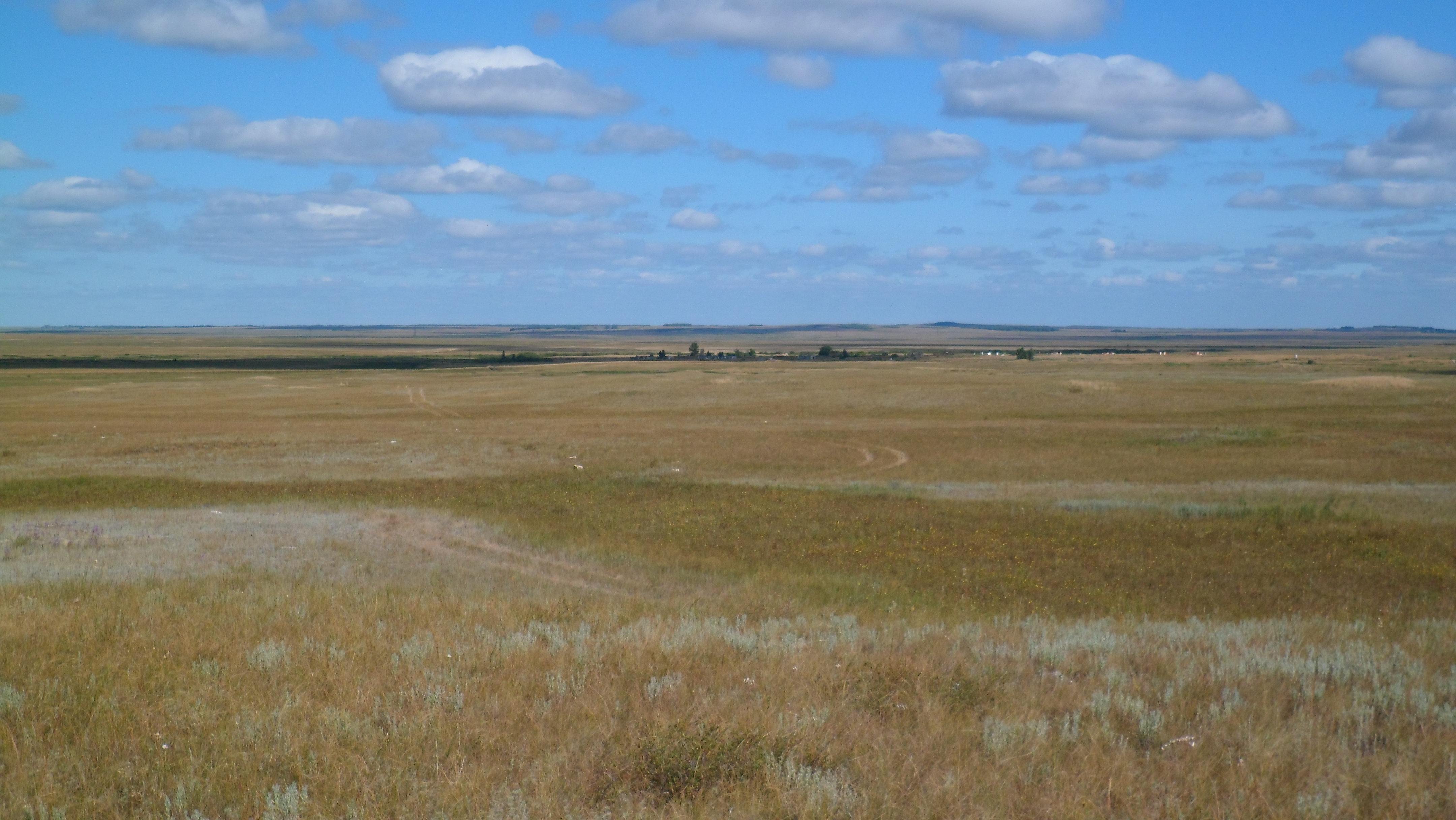 Zhetikara District, Kazakhstan